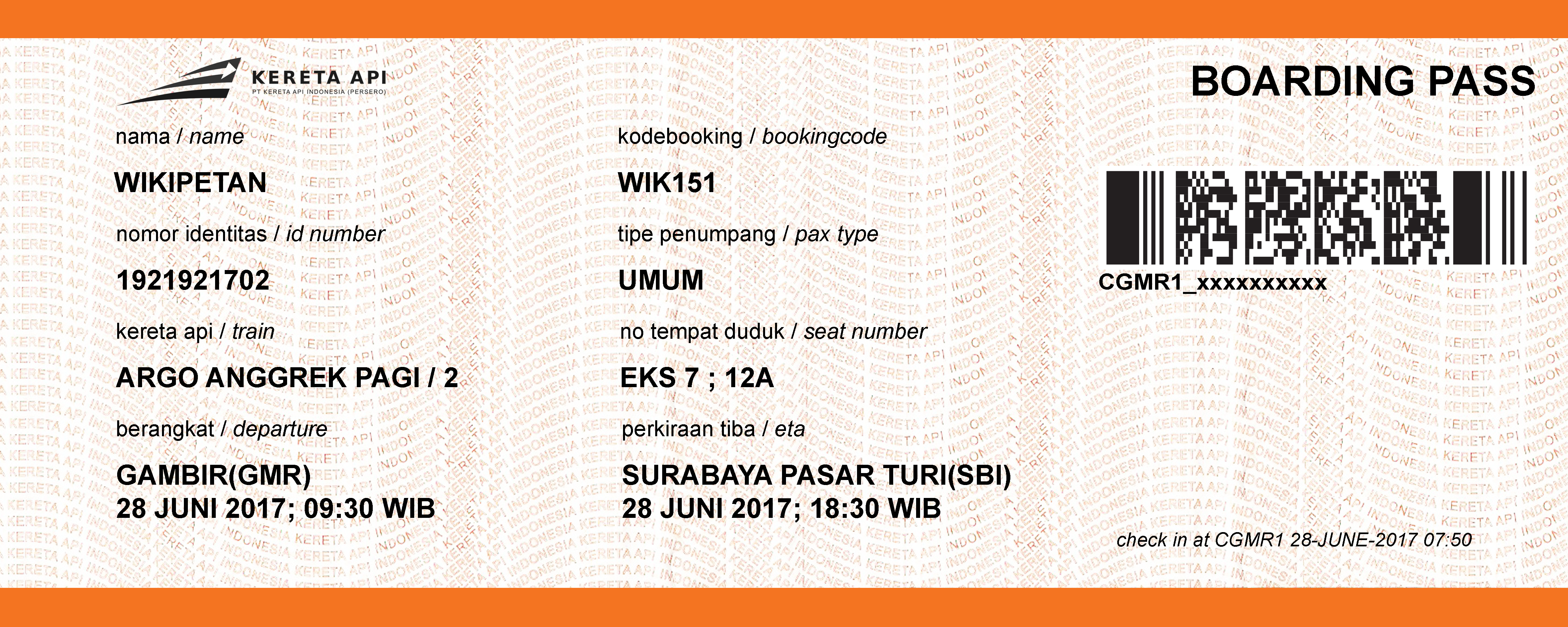 Contoh dari Tiket Kereta Api Indonesia yang berlaku sejak 2016, dengan penerapan Boarding Pass.